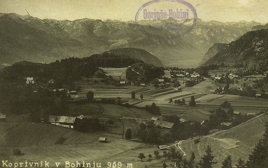 Razglednica Koprivnika v Bohinju.